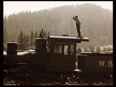 screenshot van de film 'The General'